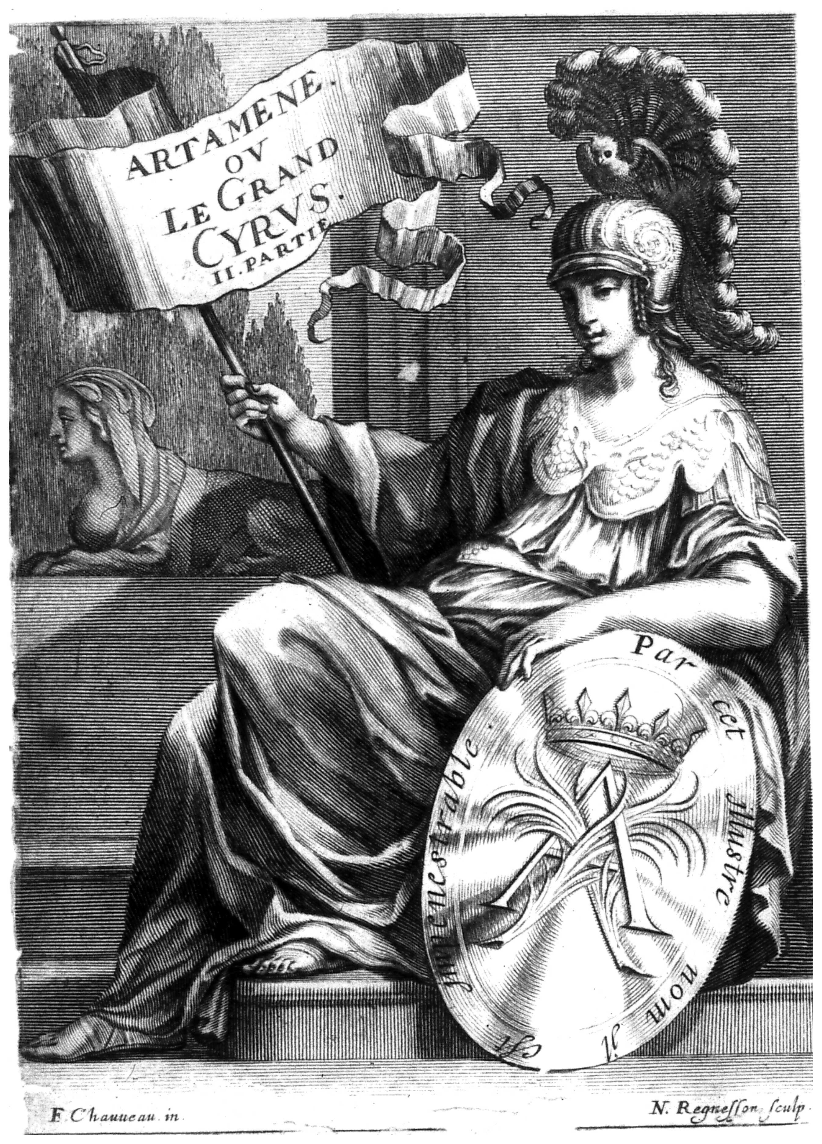 dessin de Regnesson.